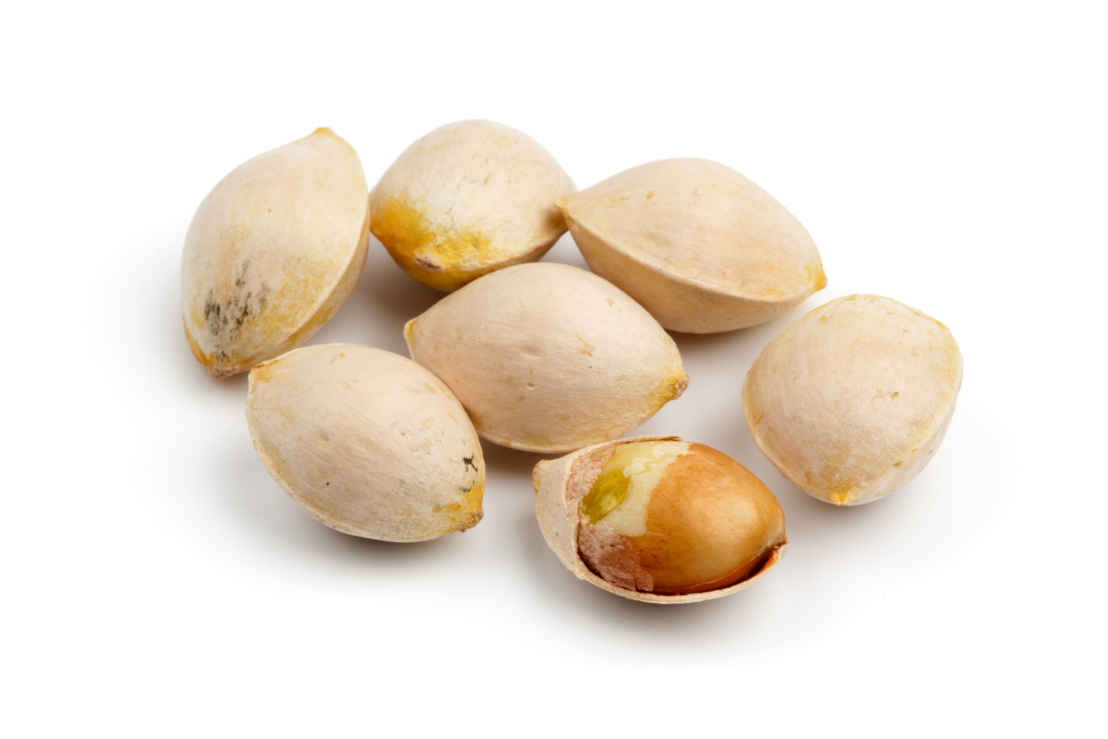 De Ginnan heeft een harde schil, de noot binnen die schil is bruikbaar voor culinaire doeleinden